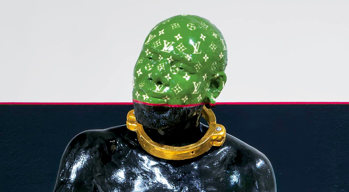 auto-portrait, céramique 2016, collection du MBAM